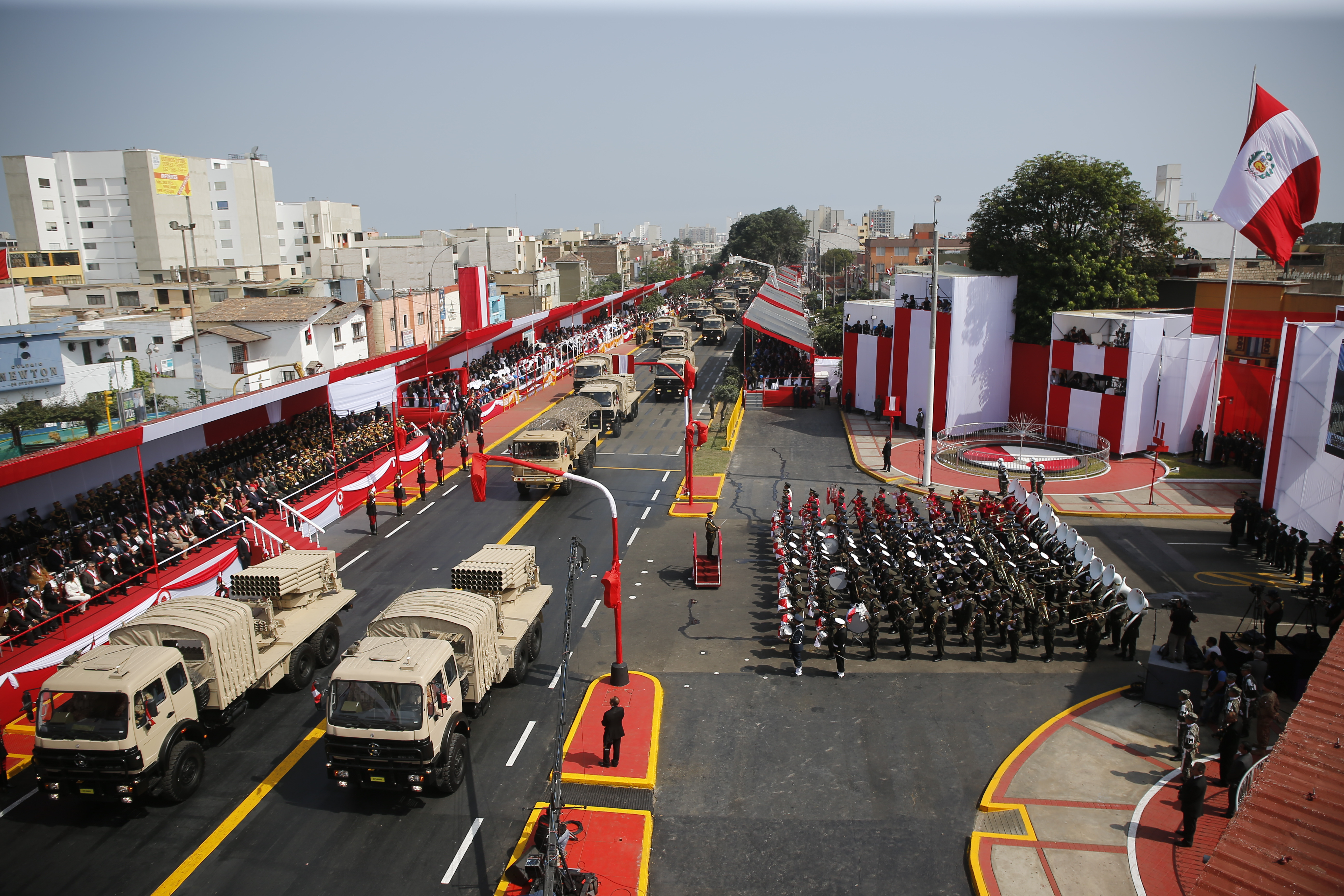 Gran Parada Militar del Perú de 2015.